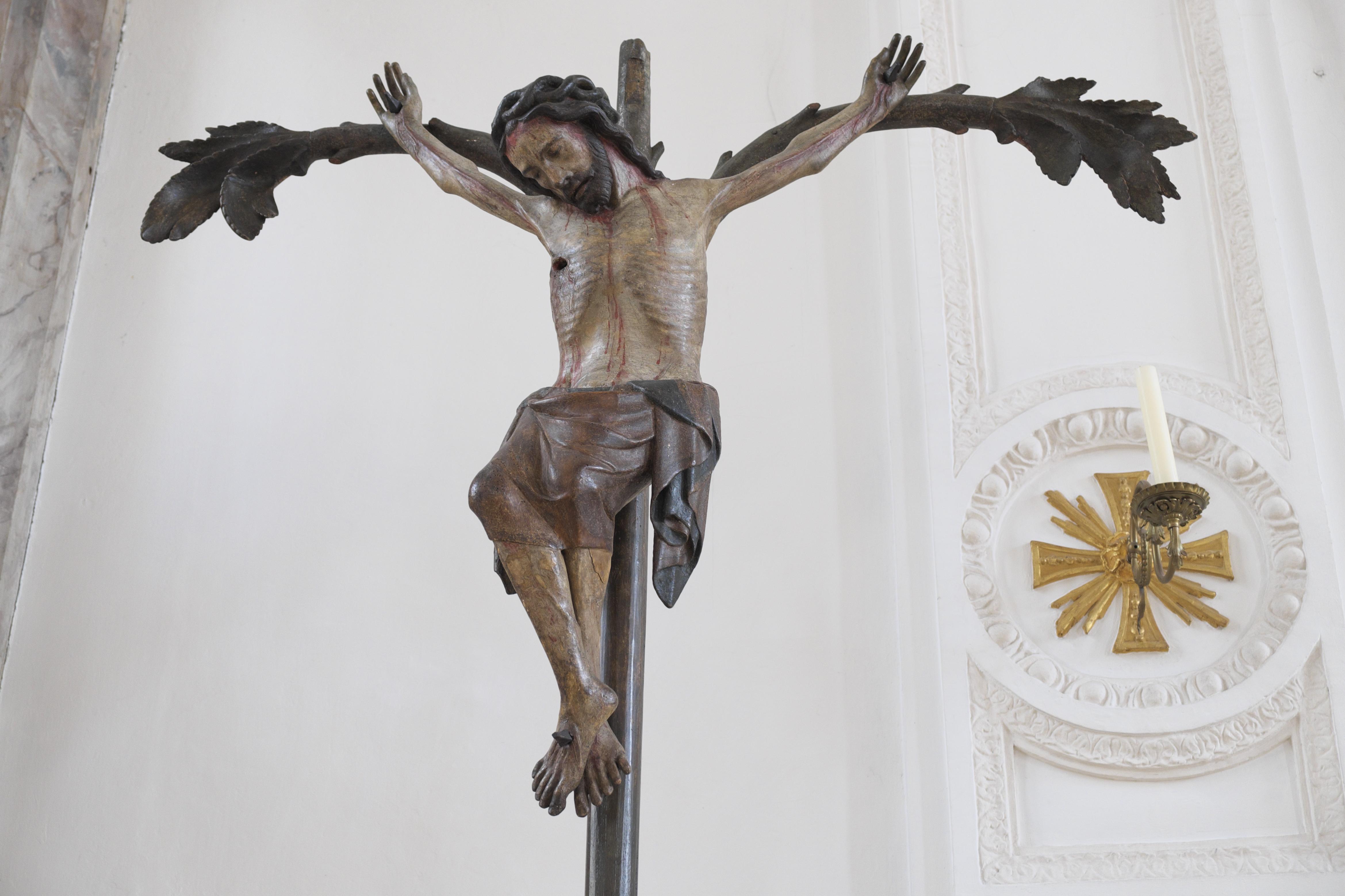 Katholische Stadtpfarrkirche Mariä Himmelfahrt in Weilheim in Oberbayern im Landkreis Weilheim-Schongau (Bayern/Deutschland), Lebensbaum, um 1350